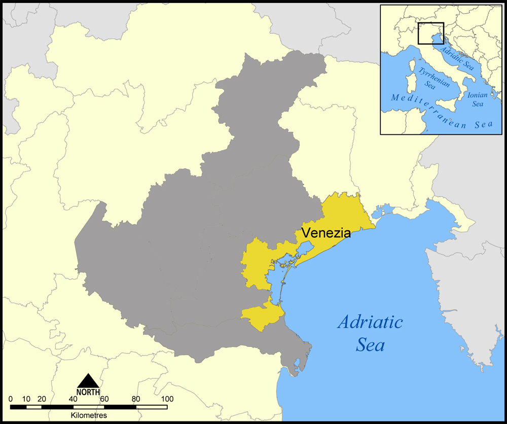 L'area della provincia di Venezia, in giallo, all'interno della regione Veneto